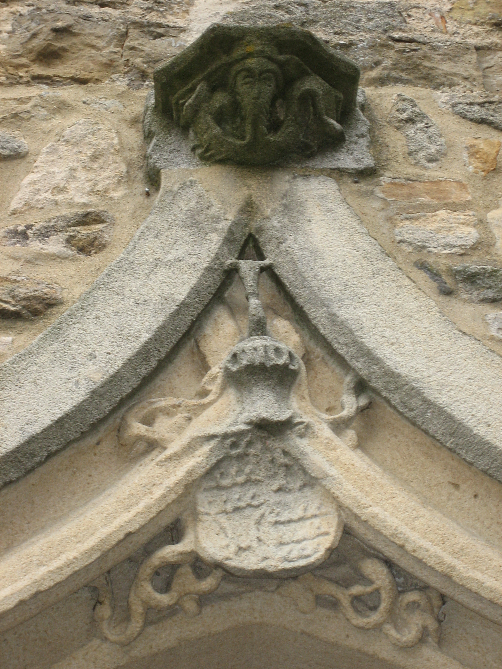 Walddorfhäslach, Evangelische Pfarrkirche Walddorf, Württembergisches Wappen 1500 Steinmetzarbeit